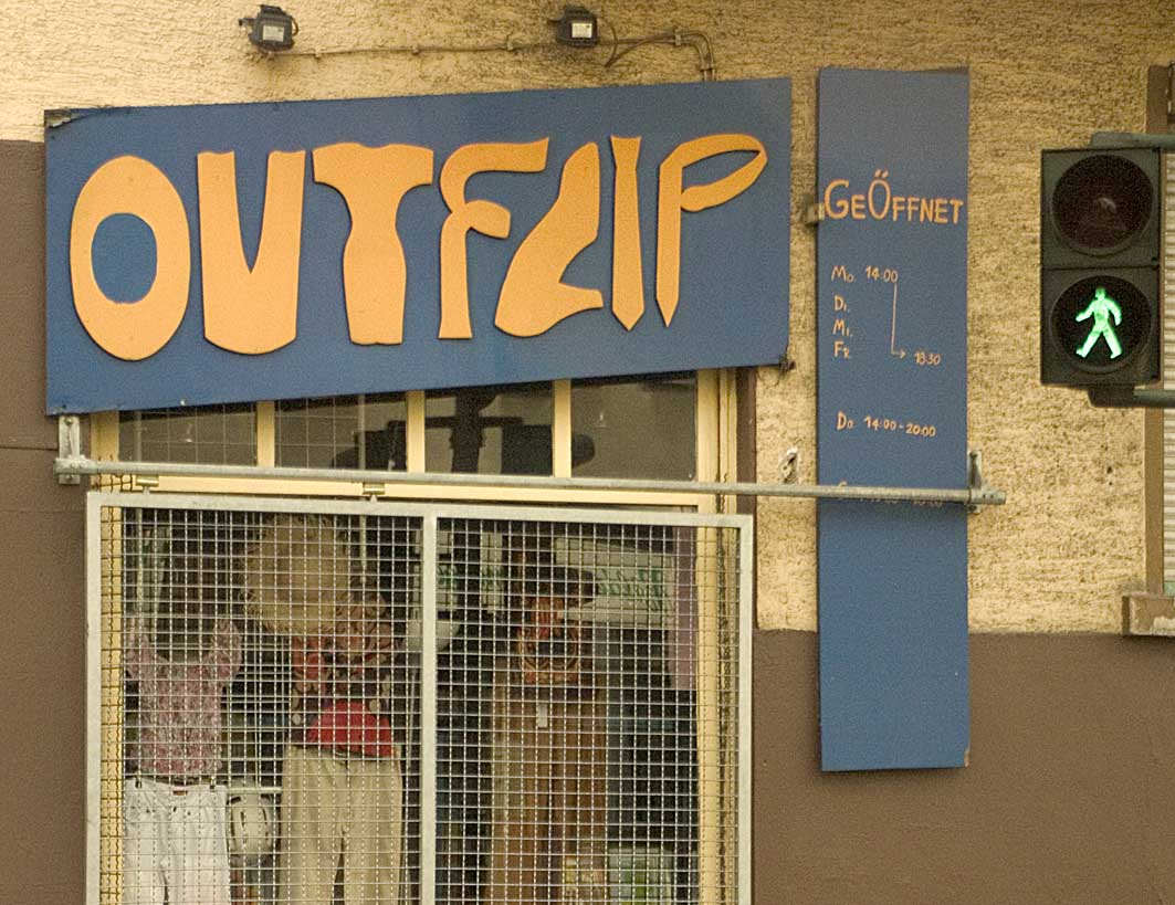 Außenwerbung, Frankfurt a. M.